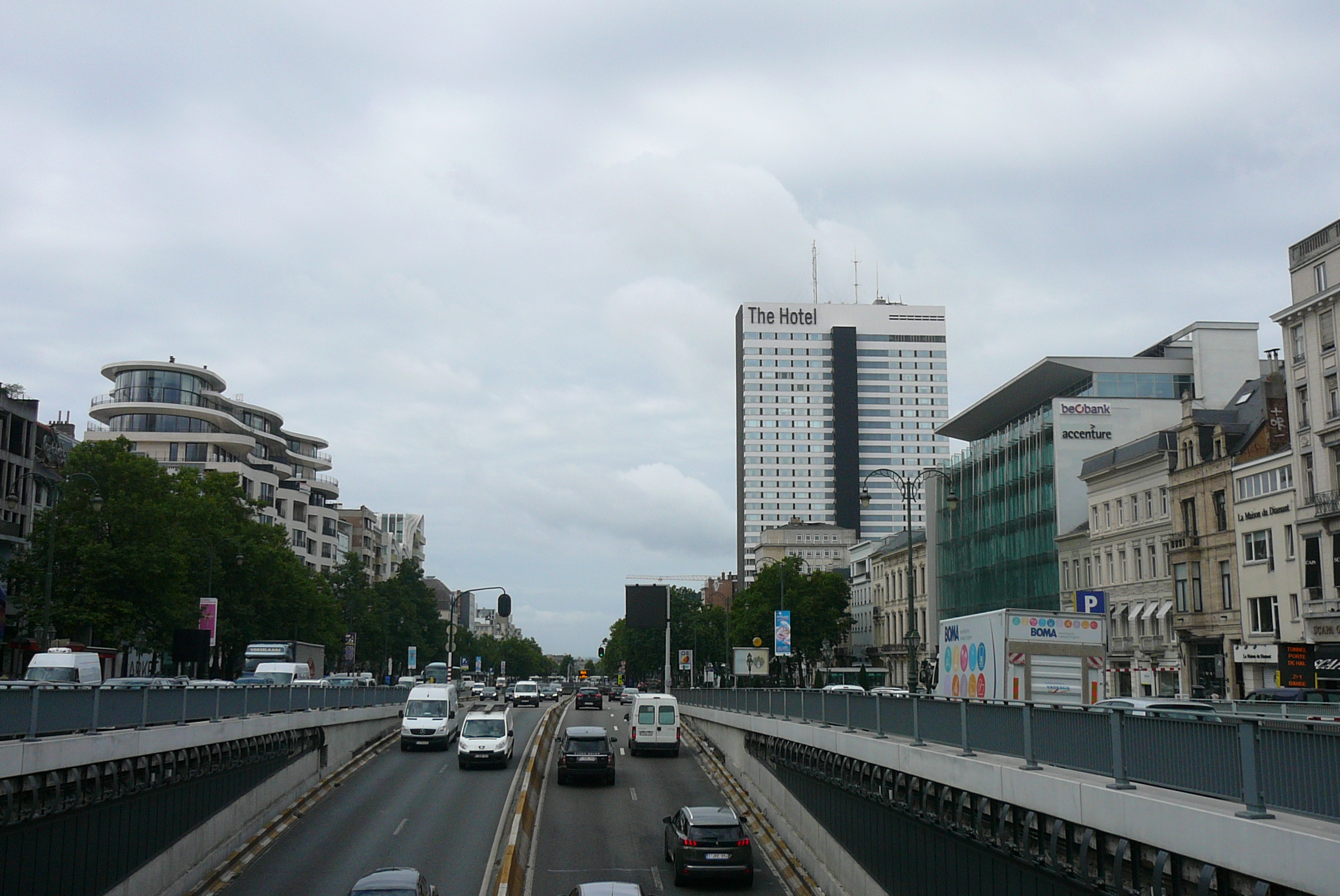 Avenue de la Toison d'Or et Boulevard de Waterloo, avec la Galerie Toison d'Or et The Hotel, à Ixelles et Bruxelles, Région bruxelloise, Belgique